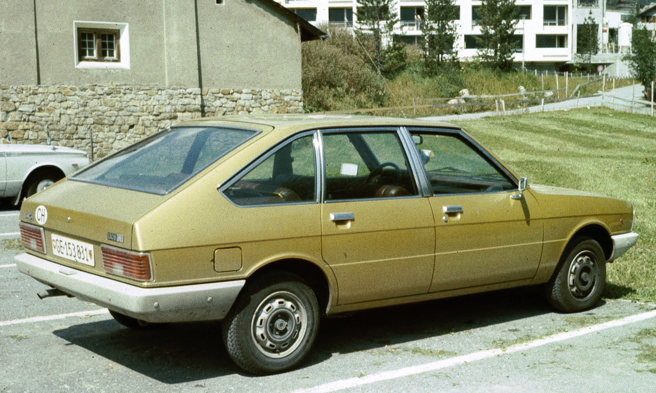 Simca 1308GT in Lenzerheide